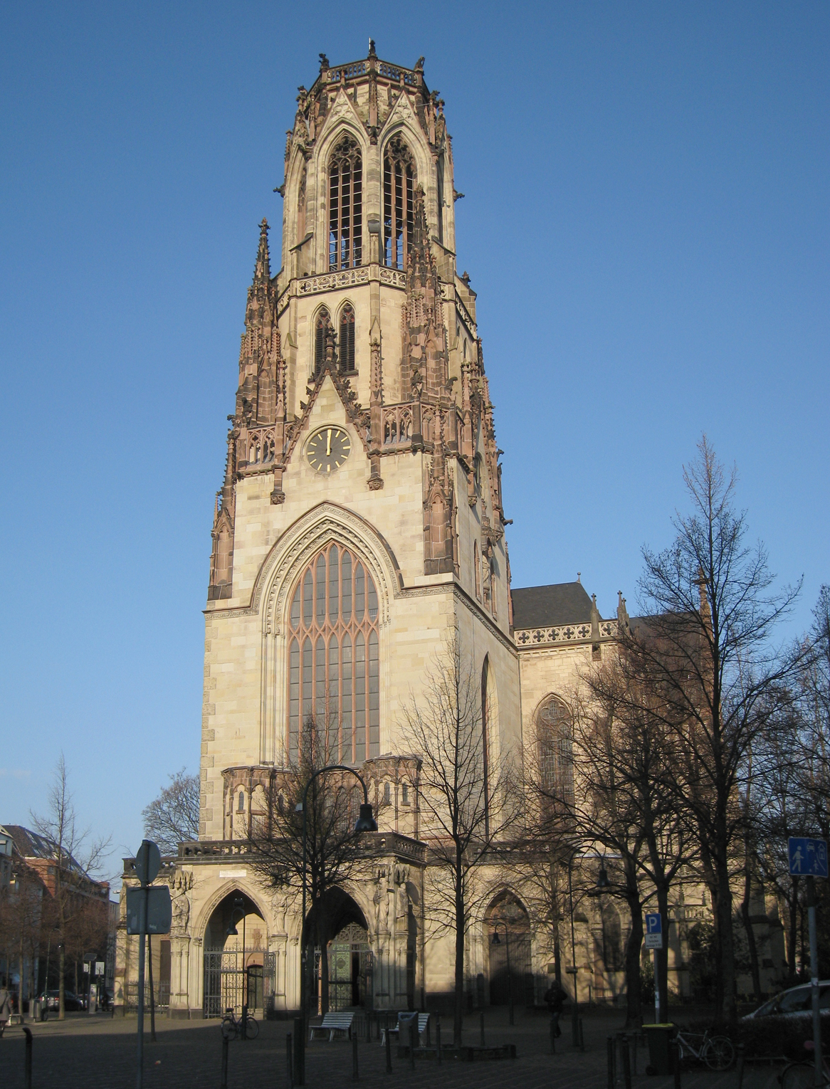 St. Agnes Kirche in Köln, Deutschland